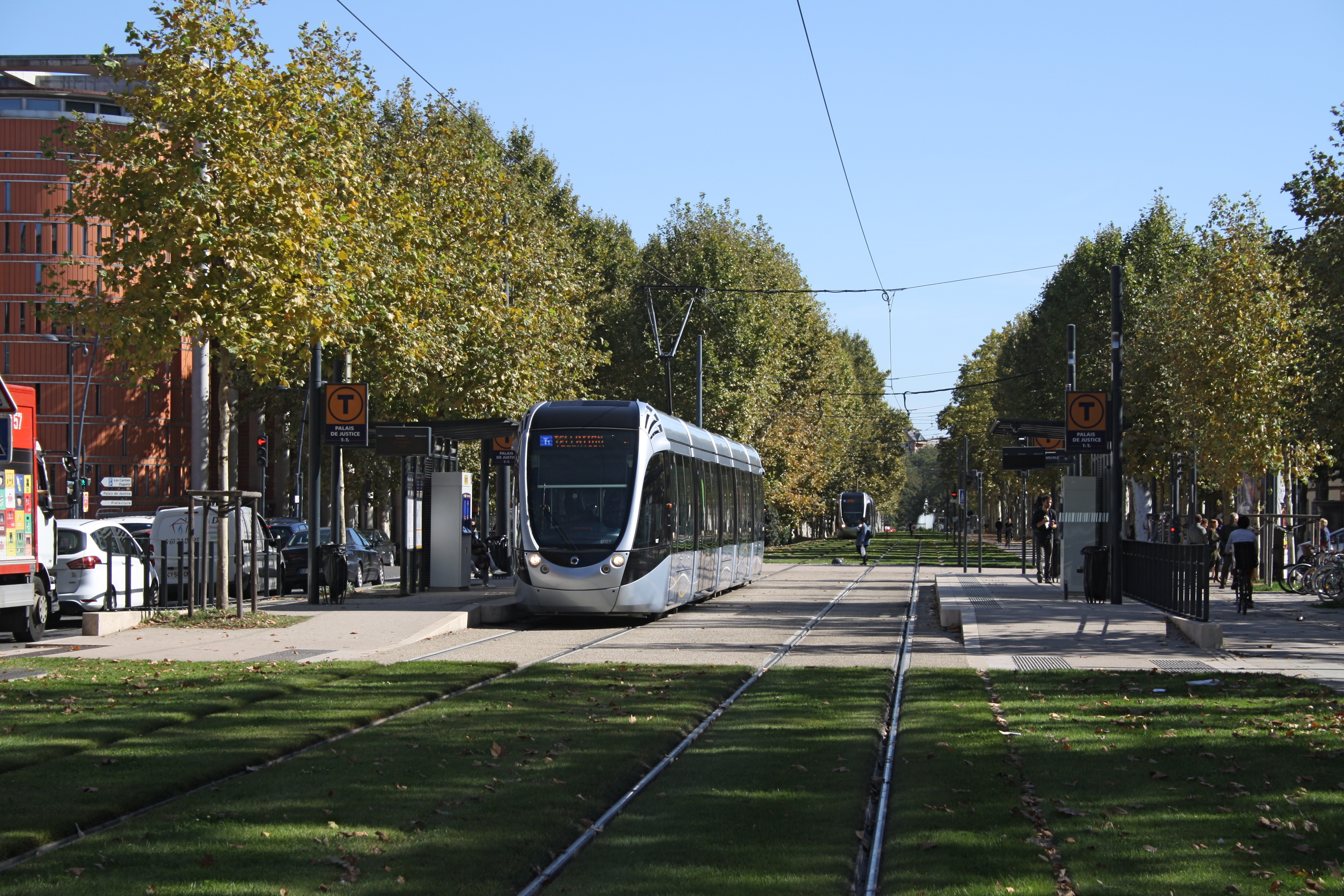 Straßenbahn Toulouse, Haltestelle Palais de Justice